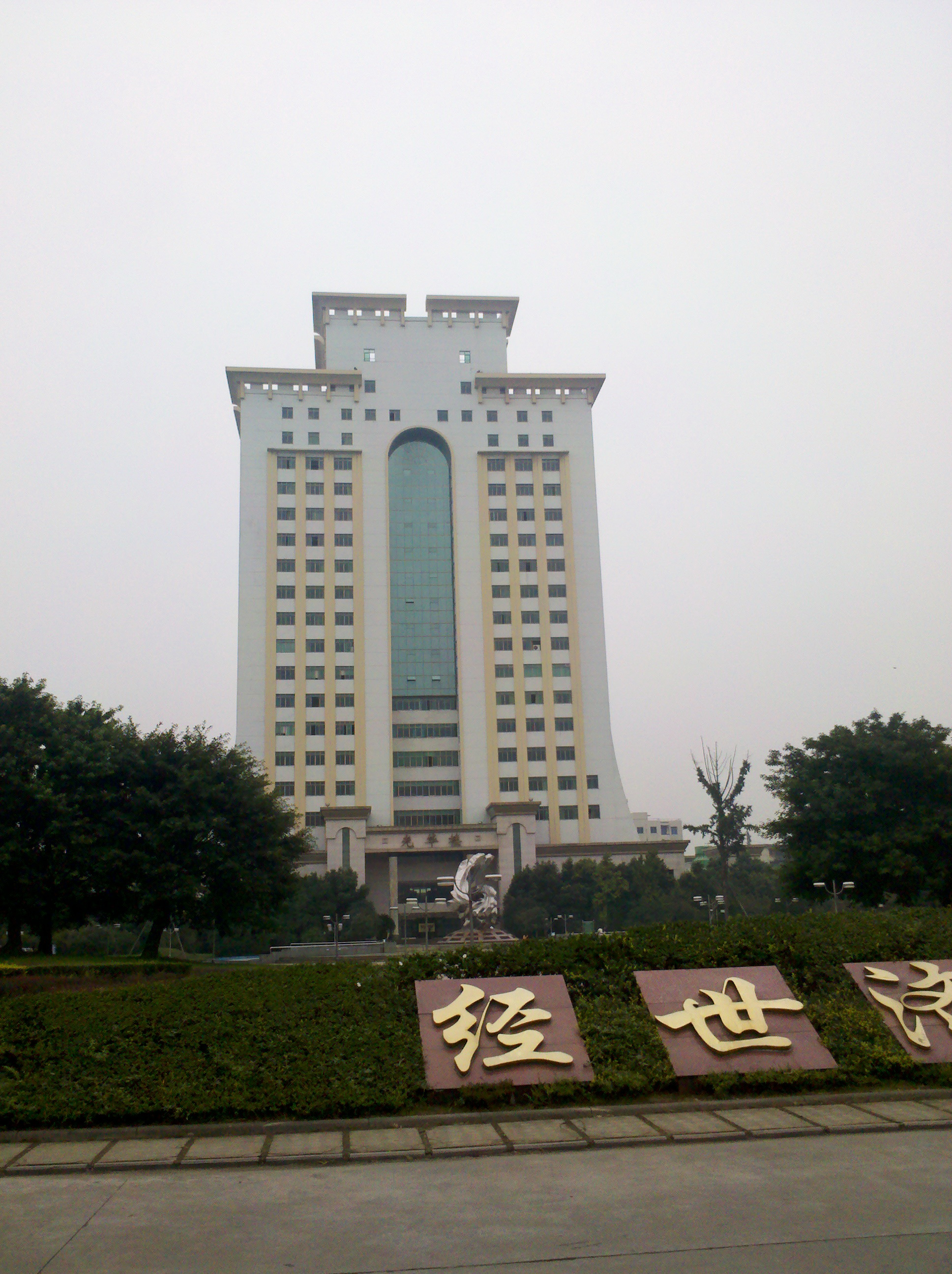 西南财经大学光华楼